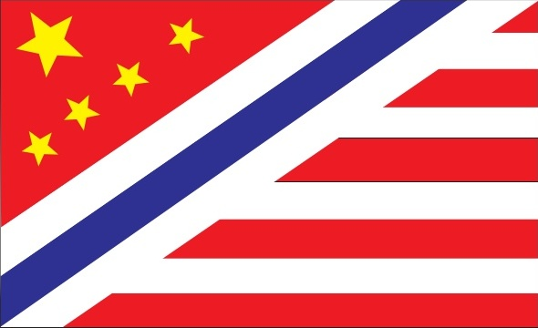 Bandeira de Mascote